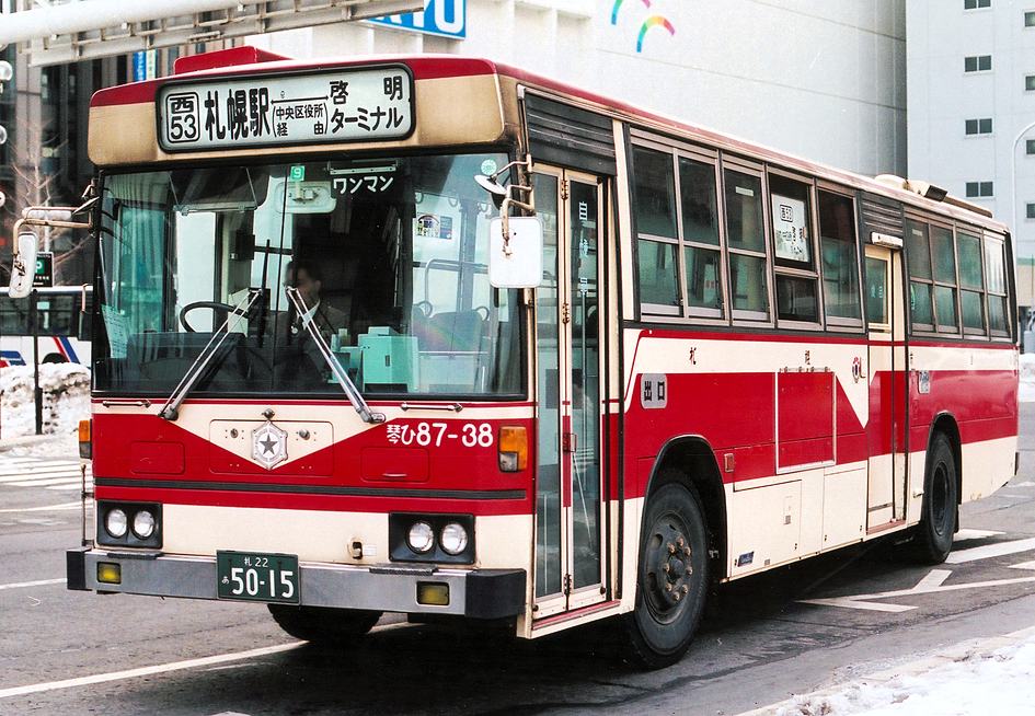 札幌市交通局 日野・ブルーリボン P-HU236BA